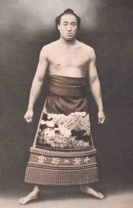 Sumo wrestler Shimizugawa Motokichi